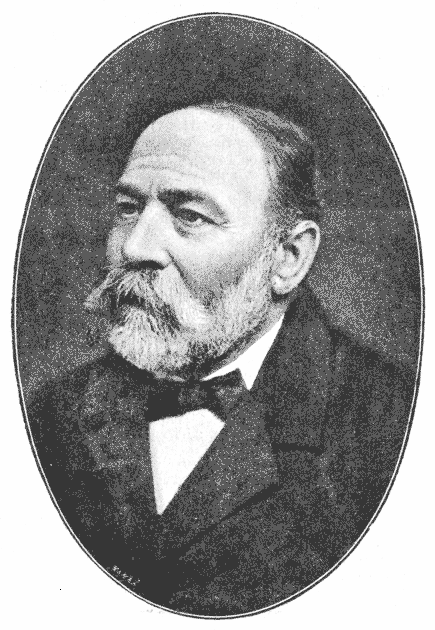 Portrait of Vojtěch Lešetický (1830 - 1908), Czech poet.